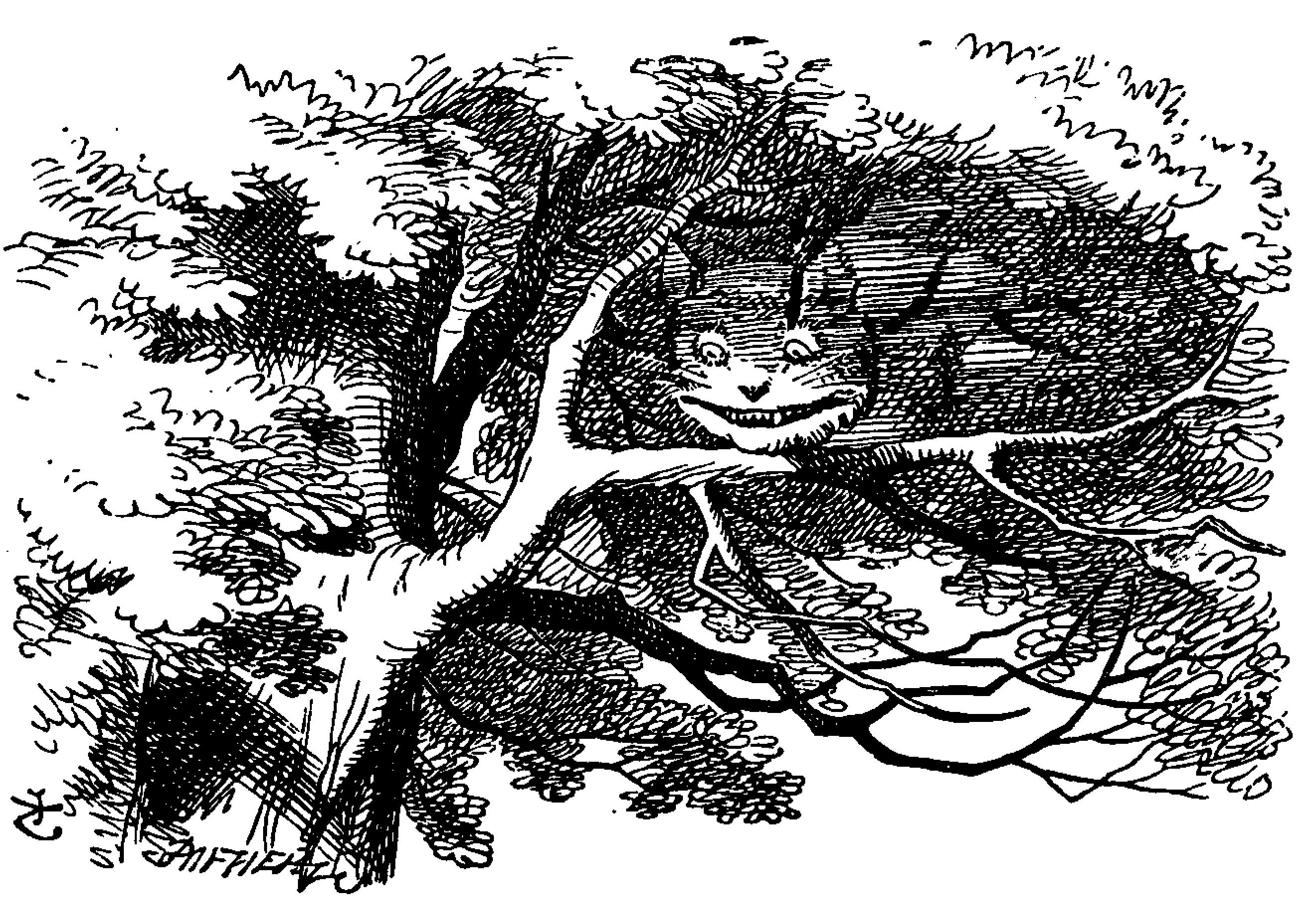 Alice’s Abenteuer im Wunderland Übersetzer: Antonie Zimmermann Orginal Titel: Alice's Adventures in Wonderland Illustrationen: John Tenniel